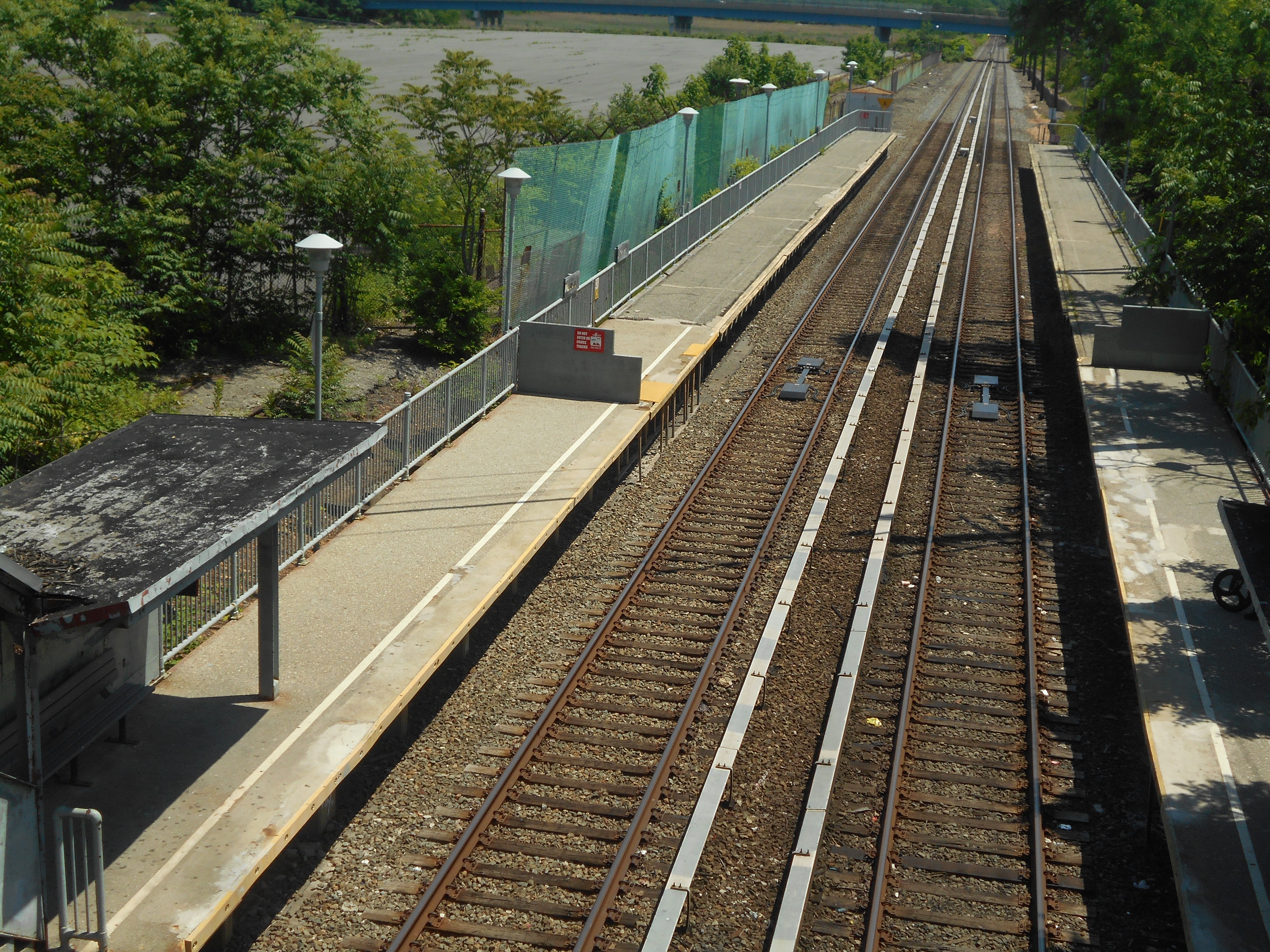 Nassau, Staten Island